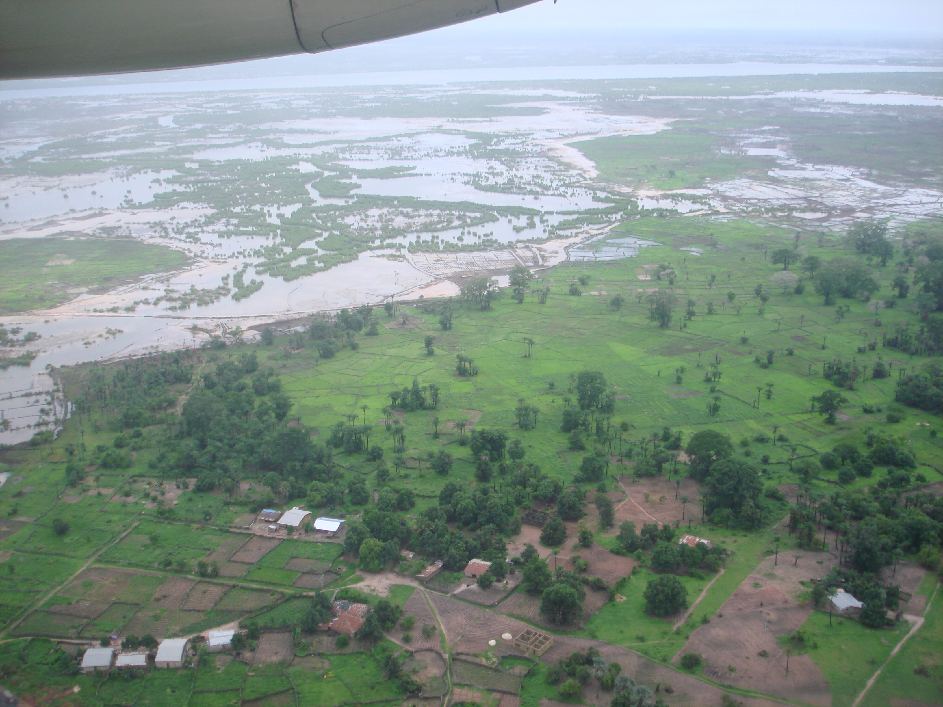 Vue sur le fleuve Casamance, peu avant l'atterrissage sur l'aéroport de Ziguinchor (Sénégal)